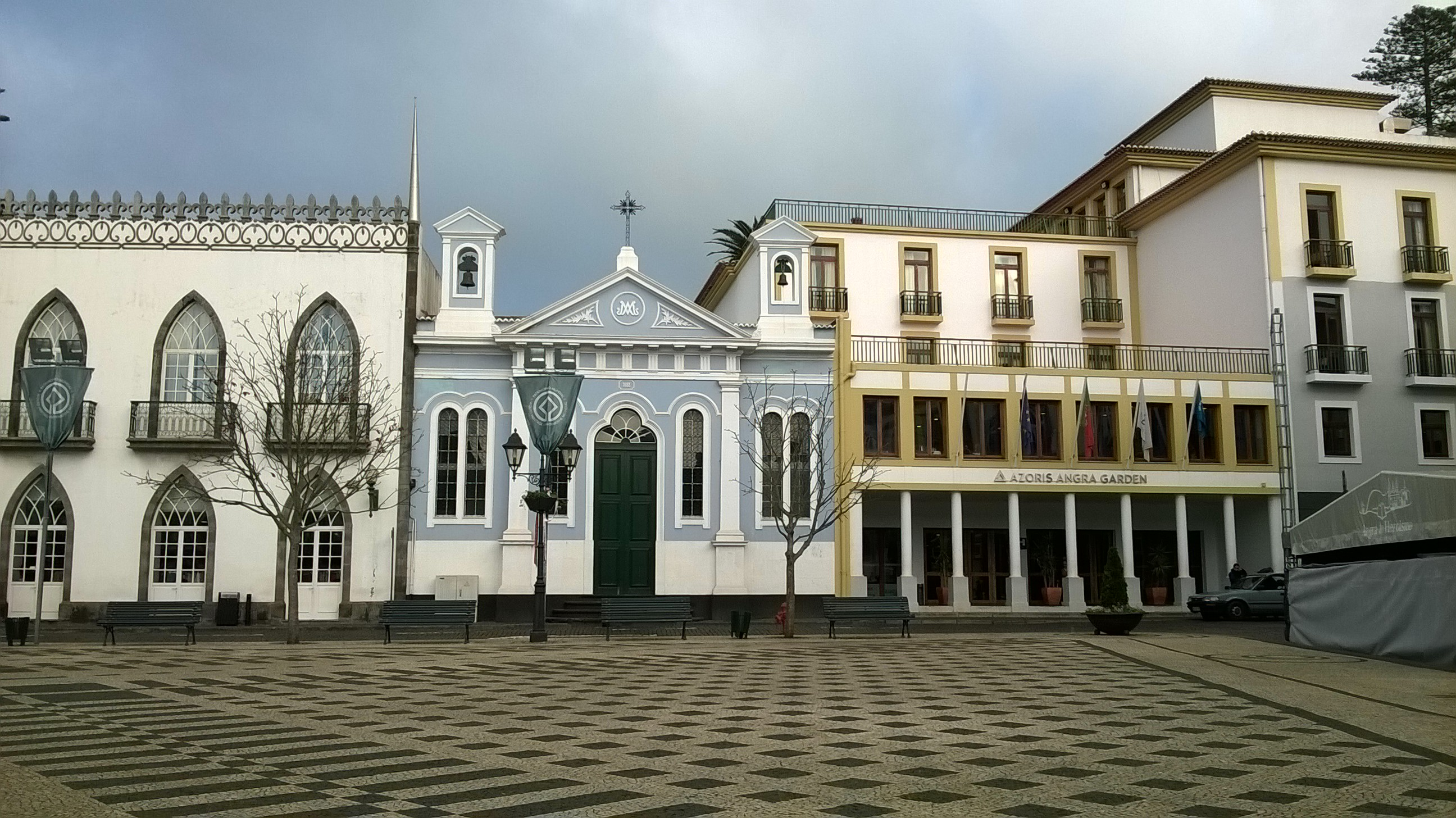 Ermida de Nossa Senhora da Saúde, Praça Velha, Angra do Heroísmo, ilha Terceira, Região Autónoma dos Açores, Portugal.